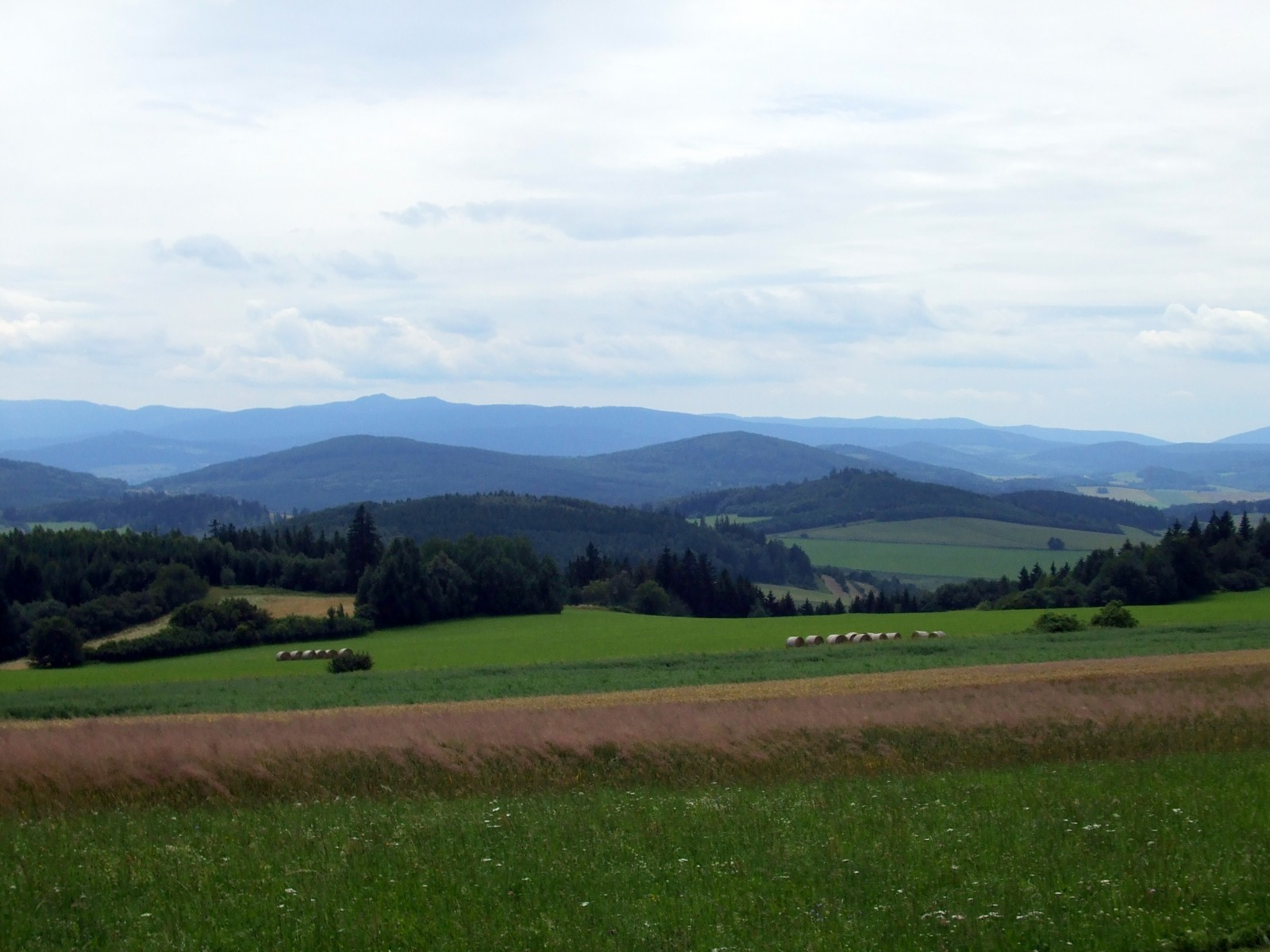 Na Branišovských lukách